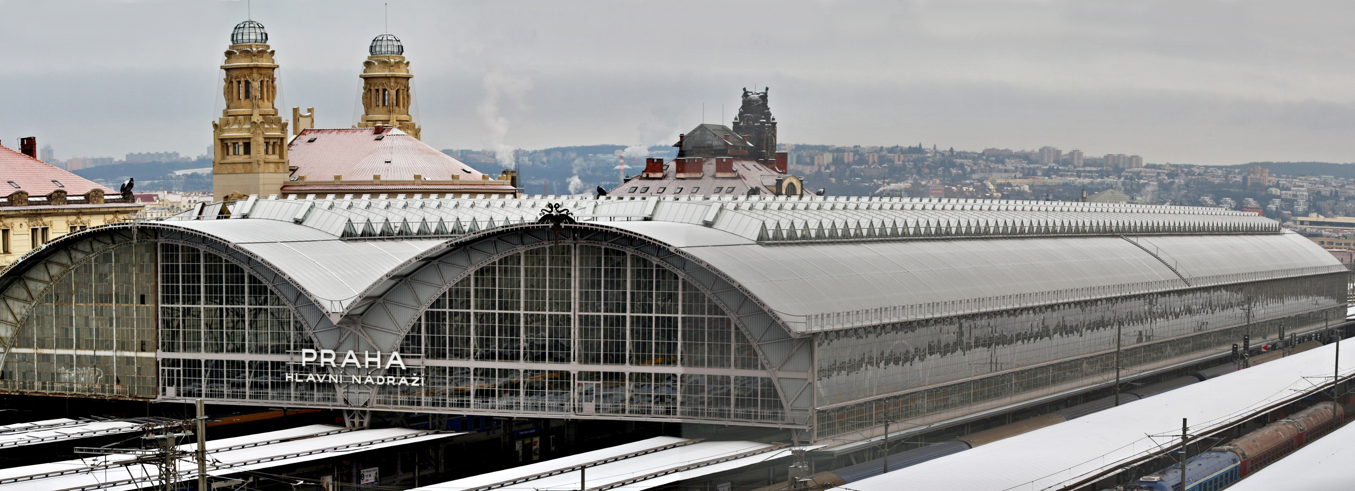 Praha hlavní nádraží